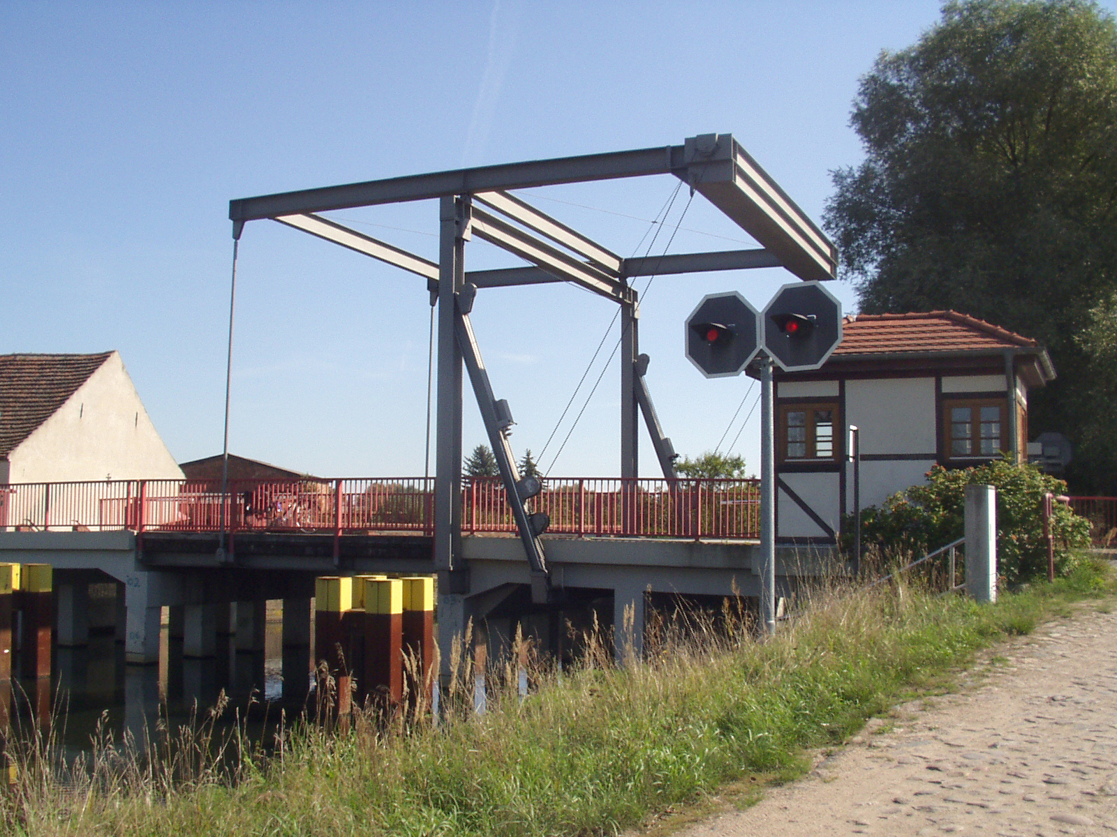 bascule bridge in Niederfinow over the Finowkanal